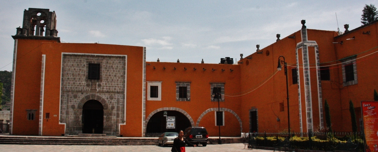 Templo del Hospital, Acámbaro, Estado de Guanajuato, México